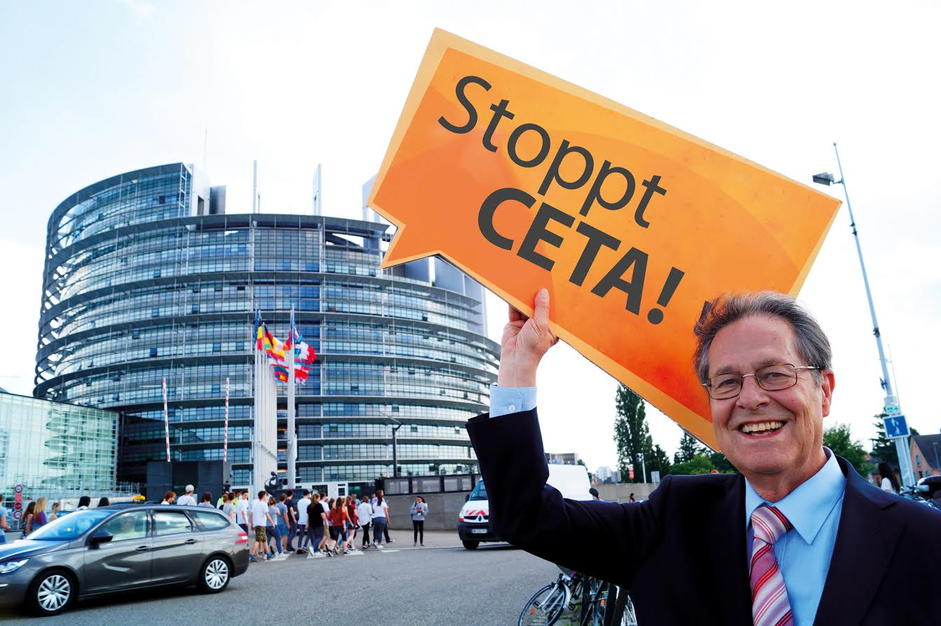 Klaus Buchner, Vorsitzender der ödp